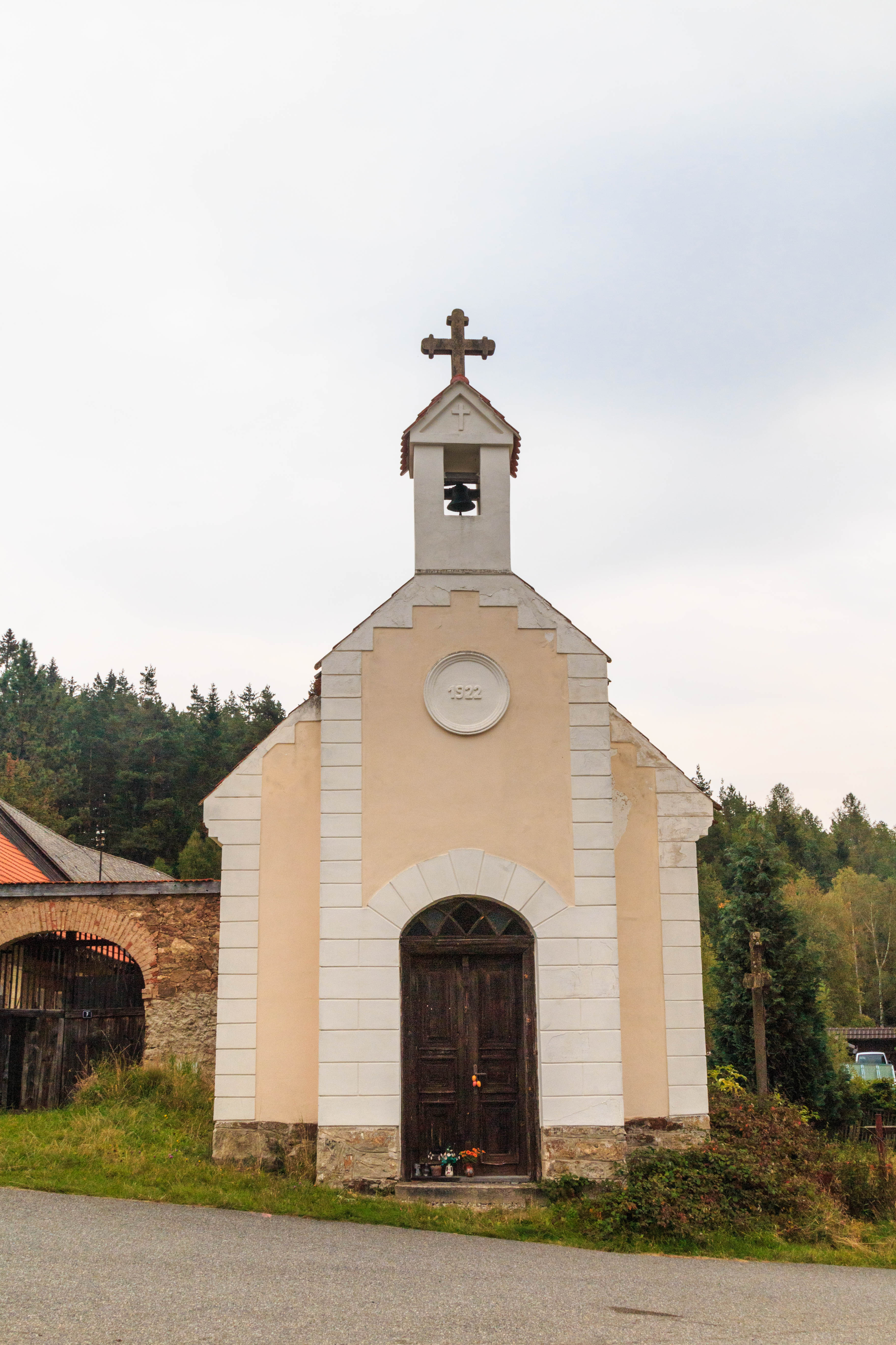 Horní Kožlí - kaple